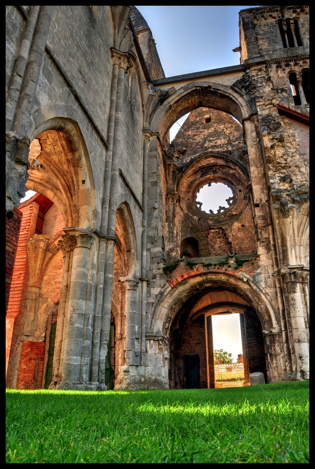 Premontrei prépostsági templom romja (Zsámbék, Régi templom u.) This is a photo of a monument in Hungary, Identifier: 7623